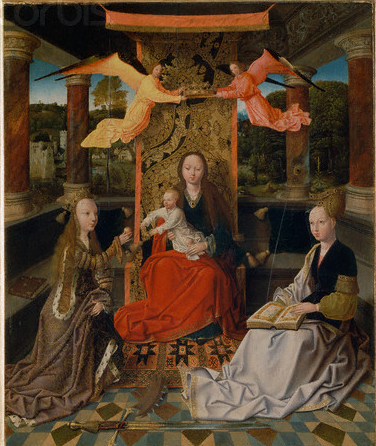 Maestro di hoogstaeten, Madonna in trono tra le sante Caterina d'Alessandria e Barbara